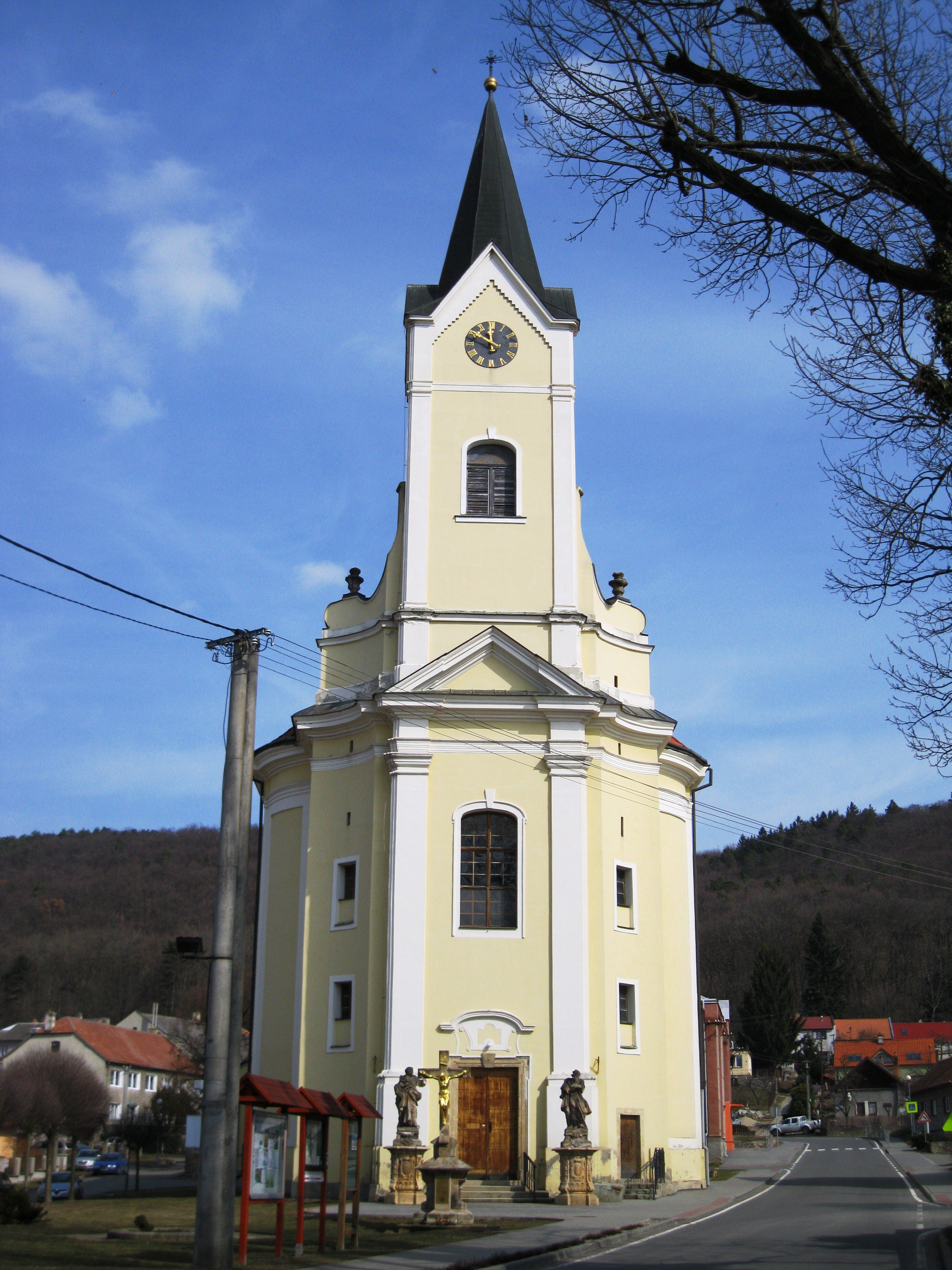 Kostel sv. Jana Křtitele (Čechy pod Kosířem), Čechy pod Kosířem